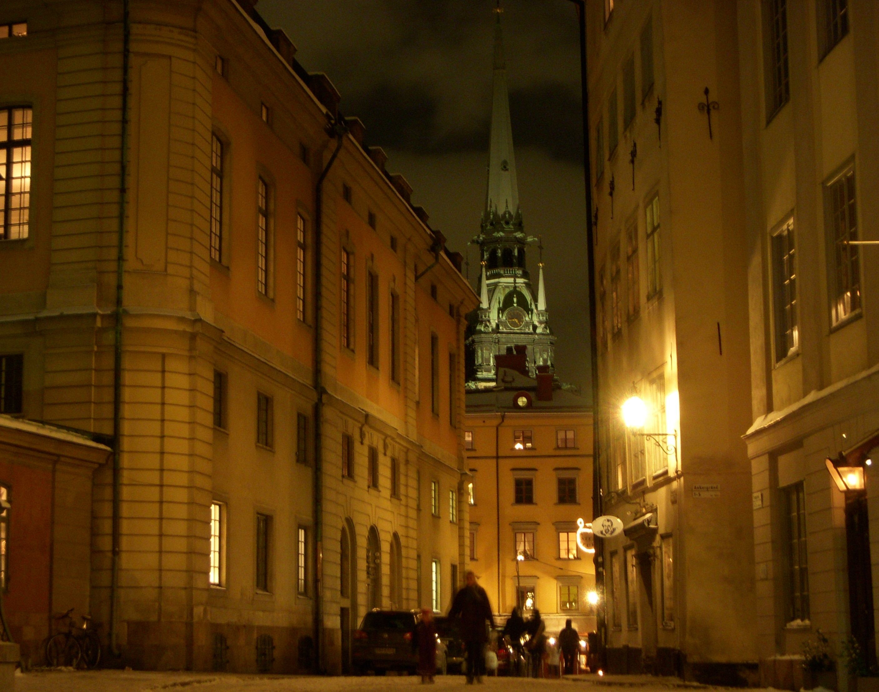 Tyska kyrkan, Stockholm, Sverige.